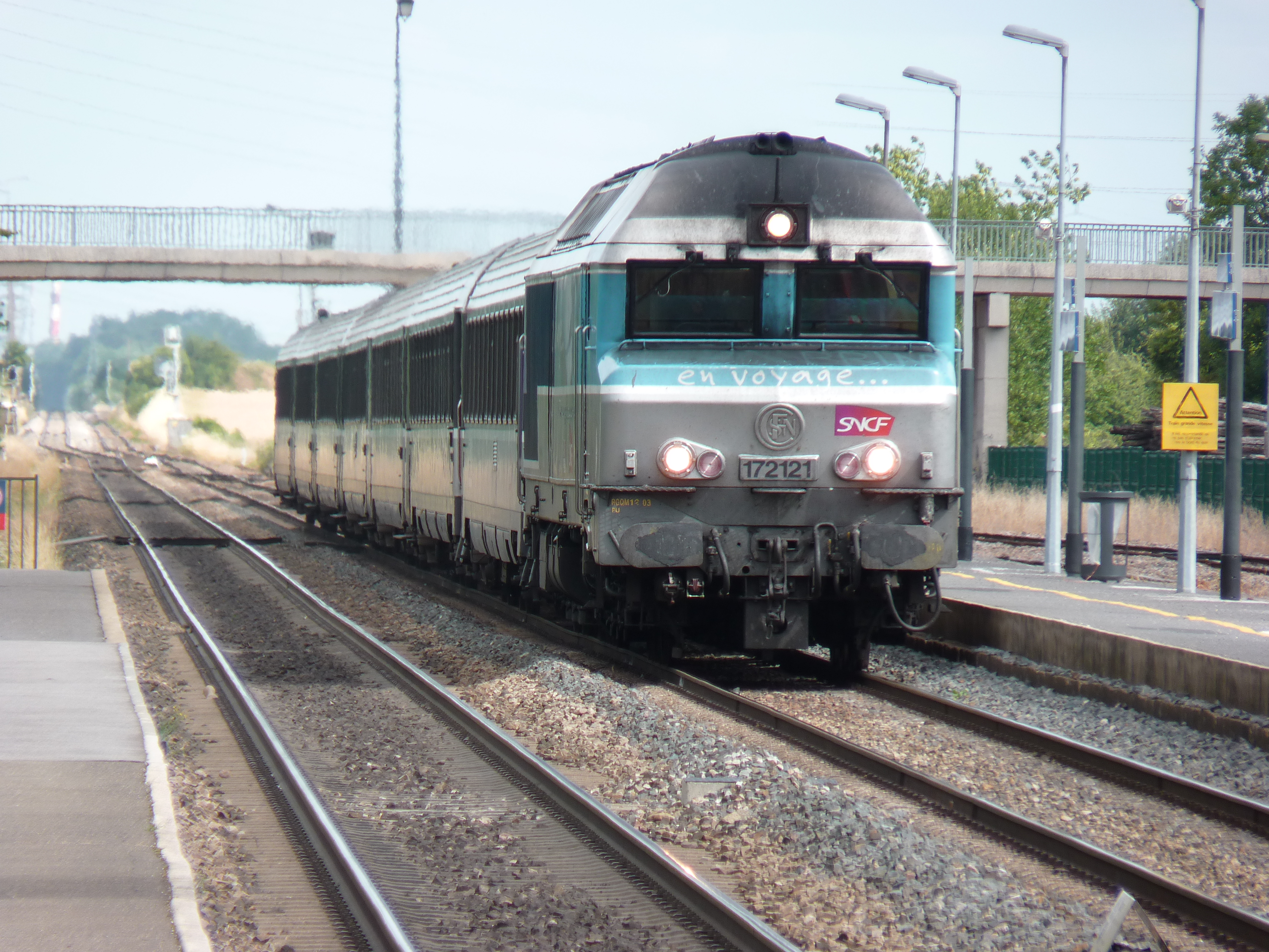 La locomotive CC 72121 tractant un intercités à destination de la Gare de l'Est en passant à la gare de Verneuil-l'Étang.